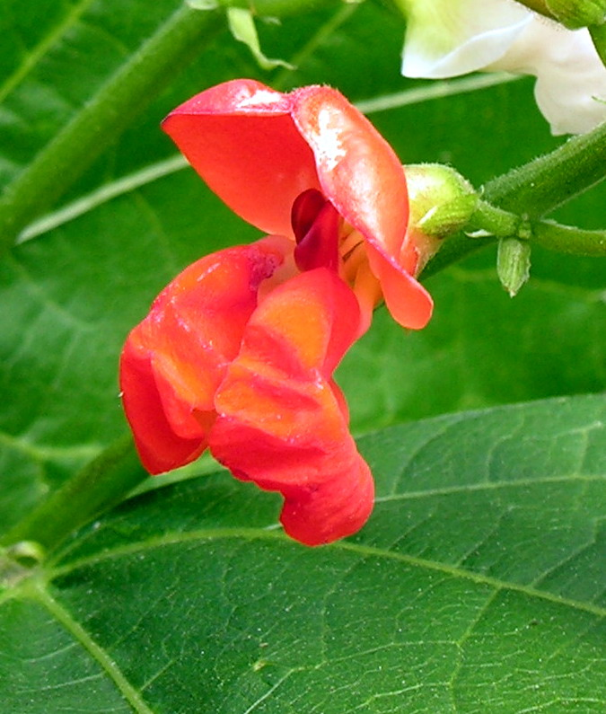 Raudonžiedė pupelė (Phaseolus coccineus), žiedas Šeima. Pupiniai (Fabaceae) Foto: Algirdas, 2006 m. liepos 14 d., Lietuva